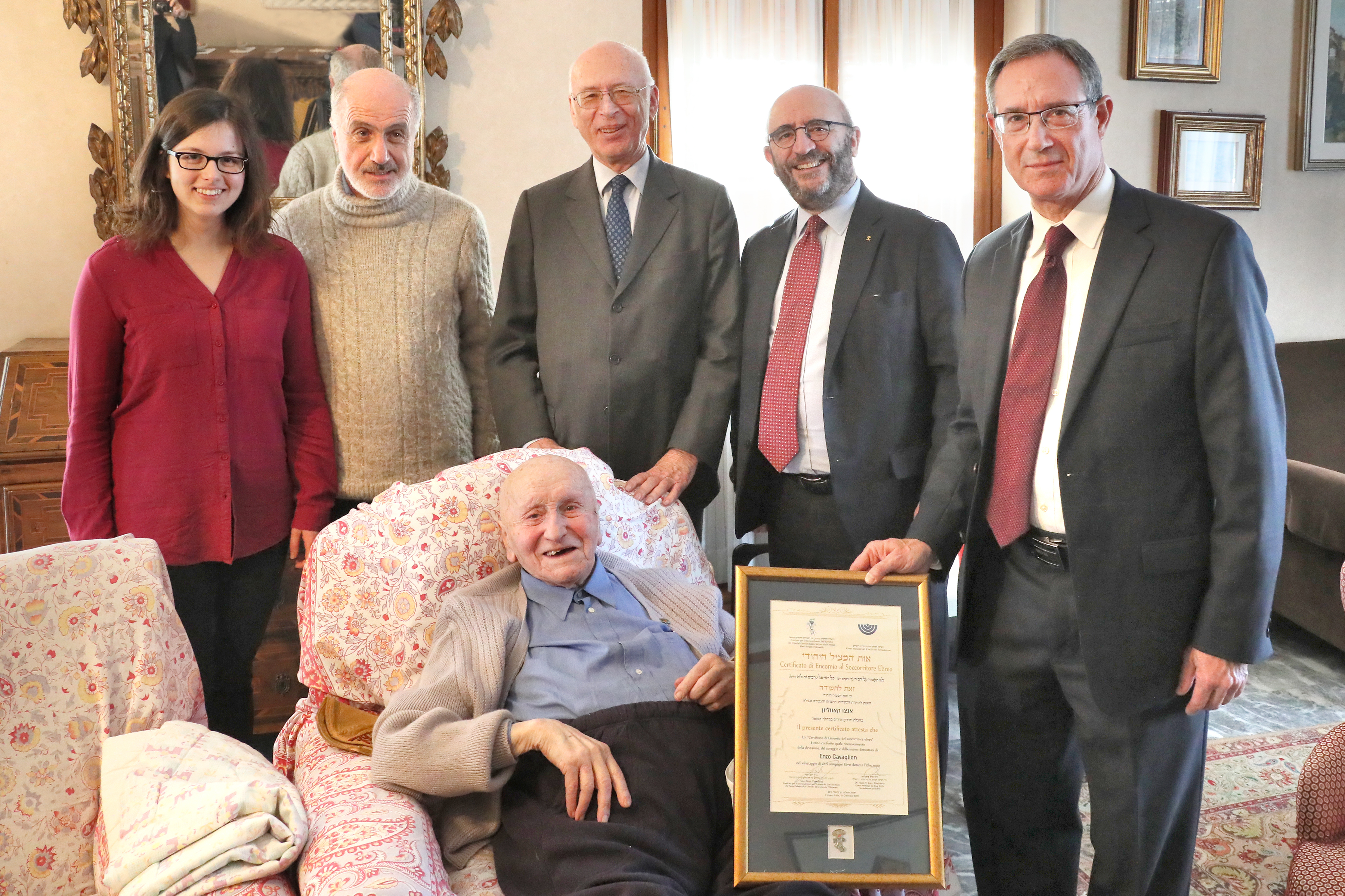 אנצו קאווליון מקבל את אות המציל היהודי מבני ברית בביתו בקונאו